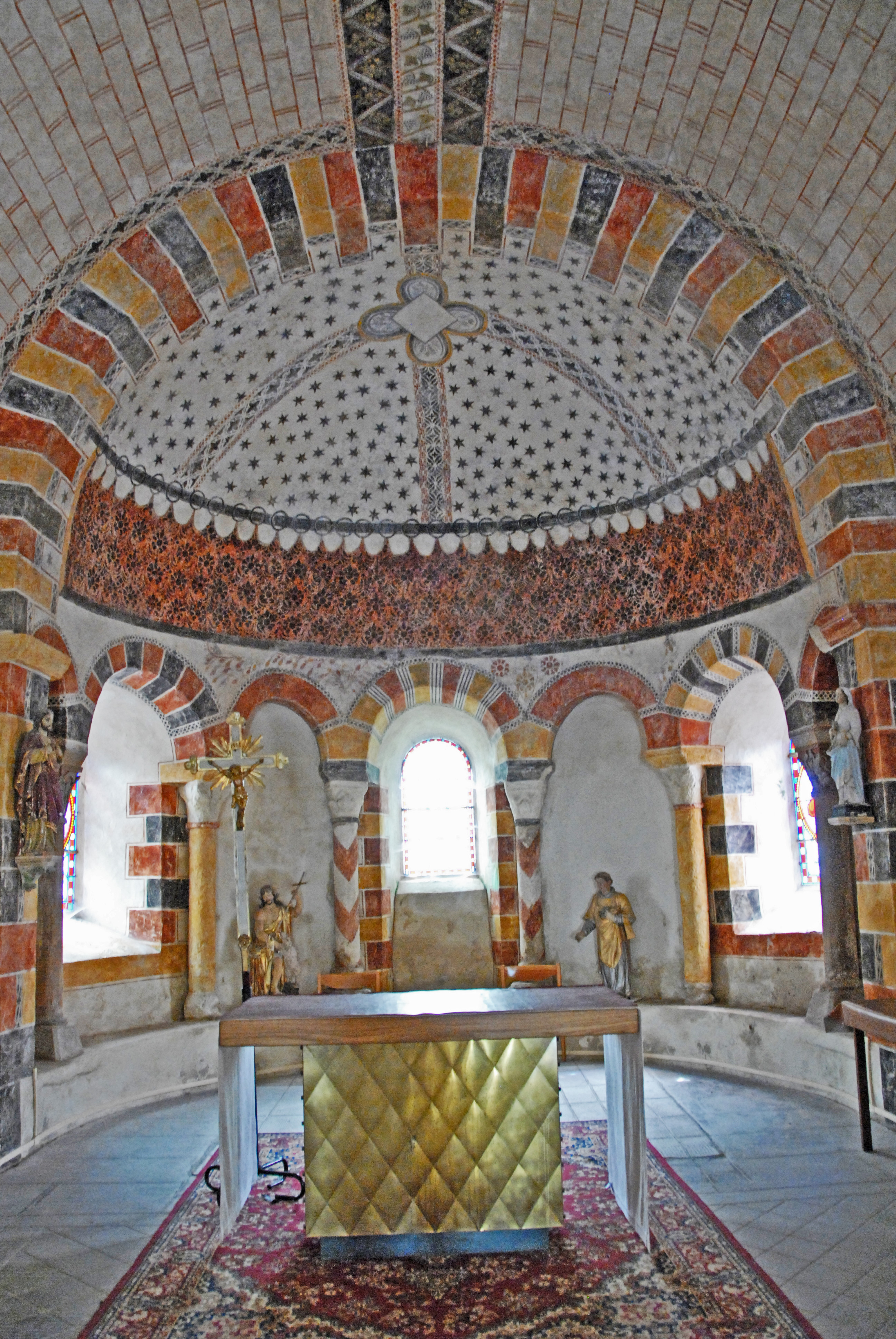 Dorfkirche Chambon-sur-Lac, Chorapsis mit Kalotte